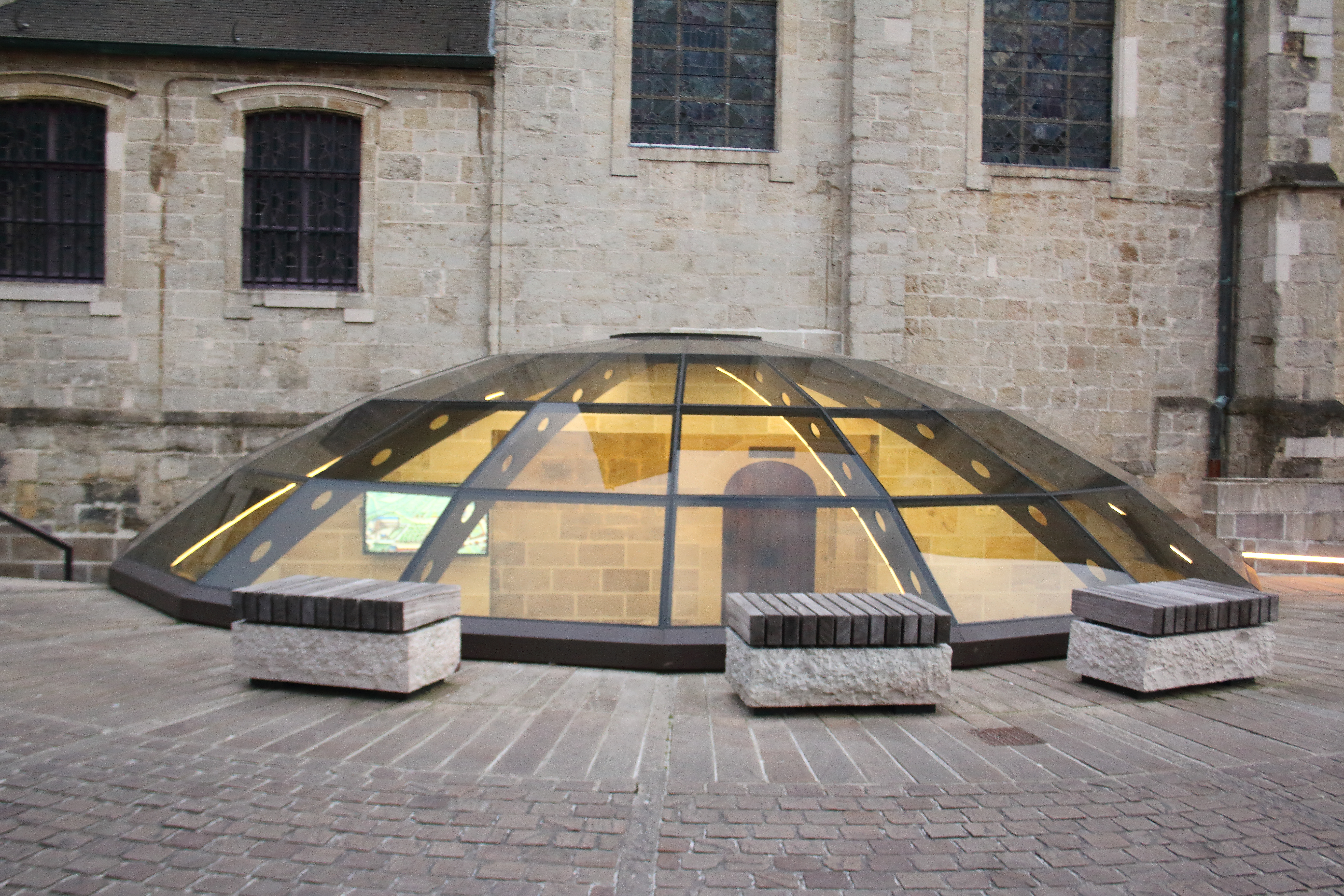 Egmontcrypte, Zottegem, Vlaanderen, België